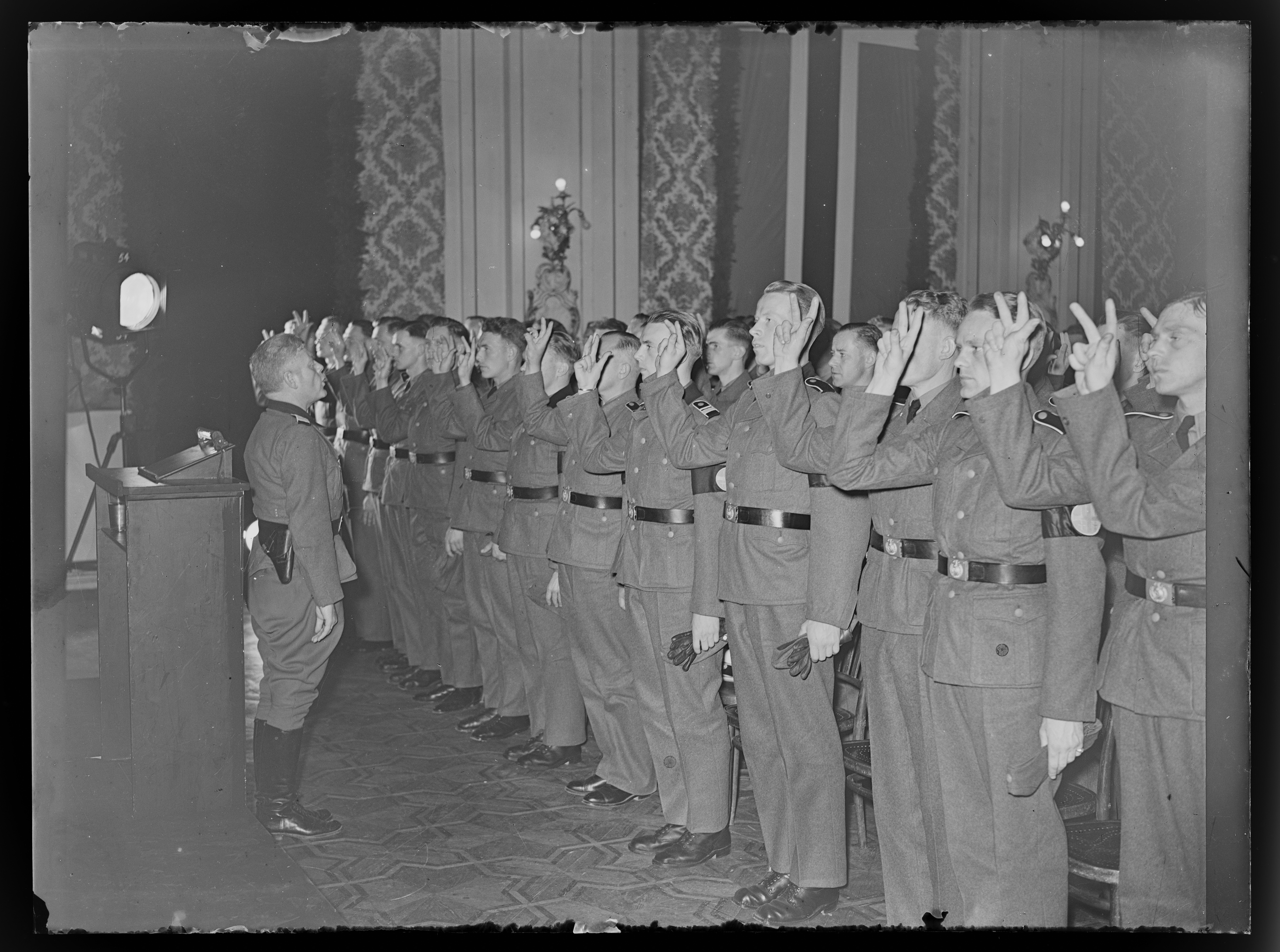 Norges SS. Edsavleggelsen